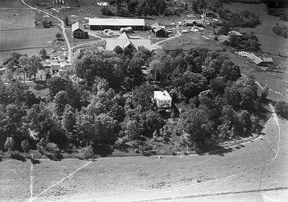 Flygfoto över Adamsberg 1936